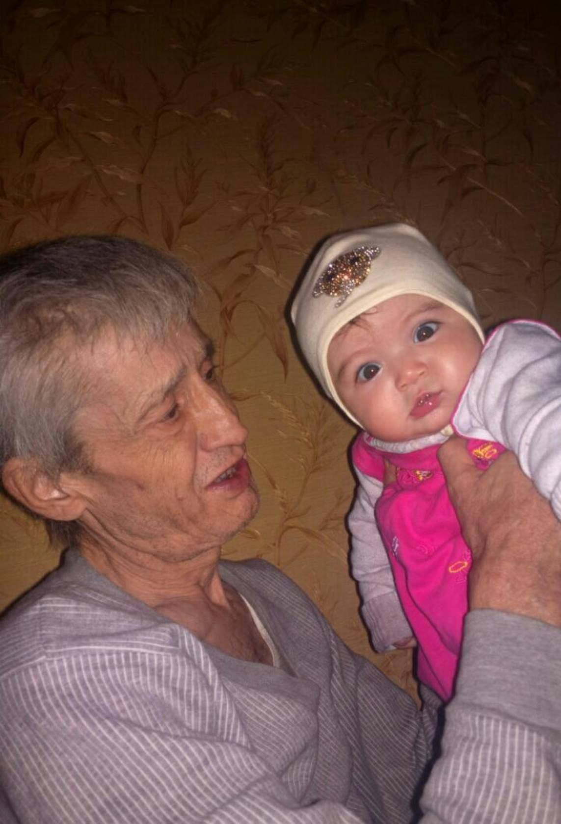 Тоҷикӣ: Субхон Саид бо наберааш соли 2015